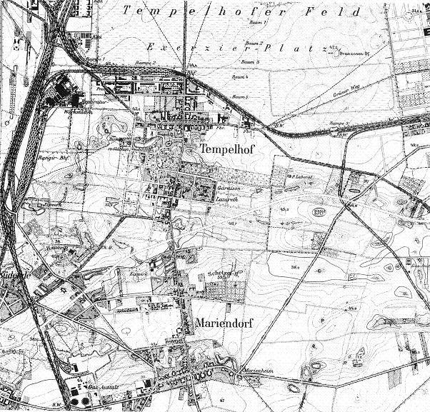 Map 1:25.000 Berlin-Tempelhof und Berlin-Mariendorf with parts of Berlin-Schöneberg, 1901